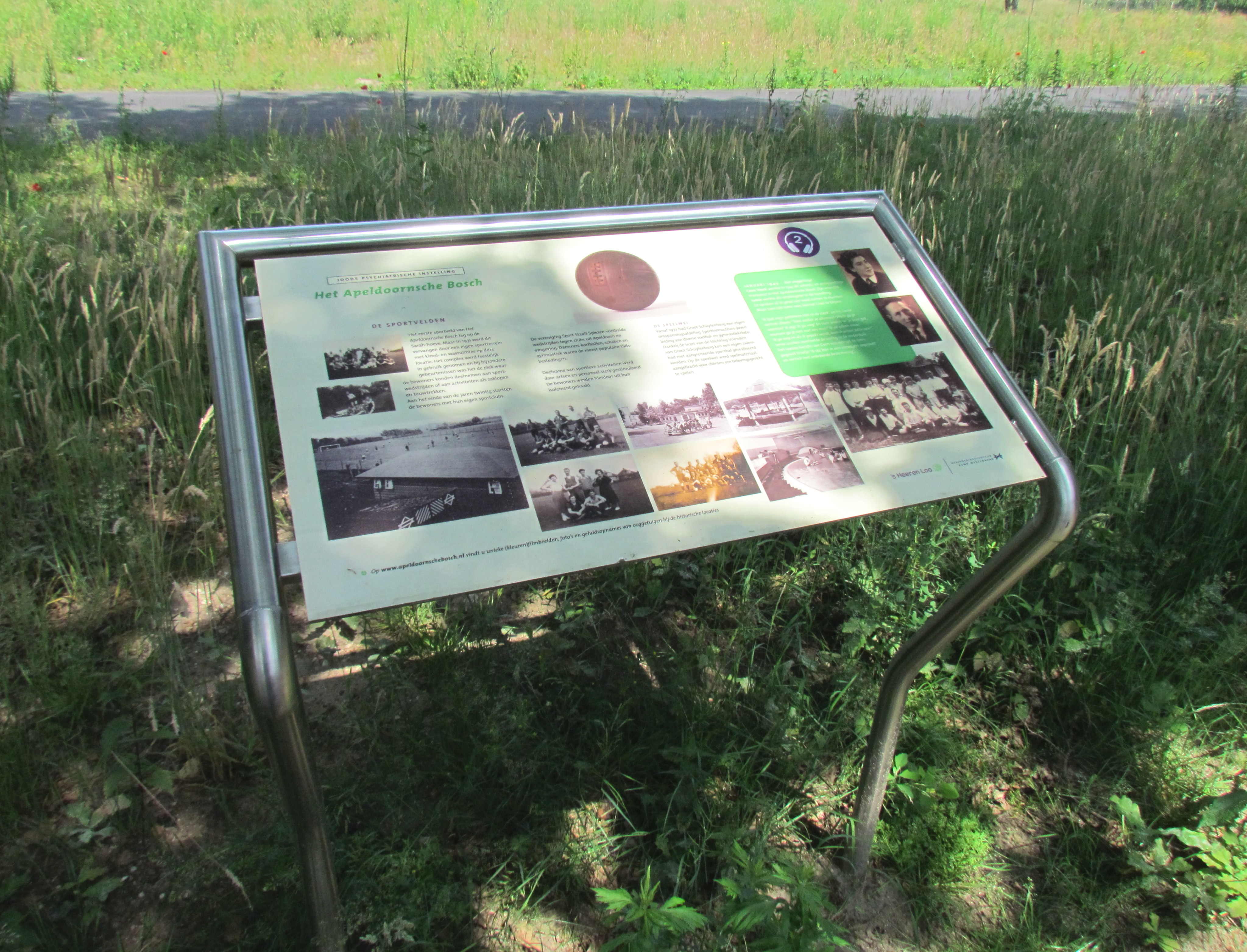 Het Apeldoornsche Bosch, informatiepaneel over 'Paedagogoium Achisomog'